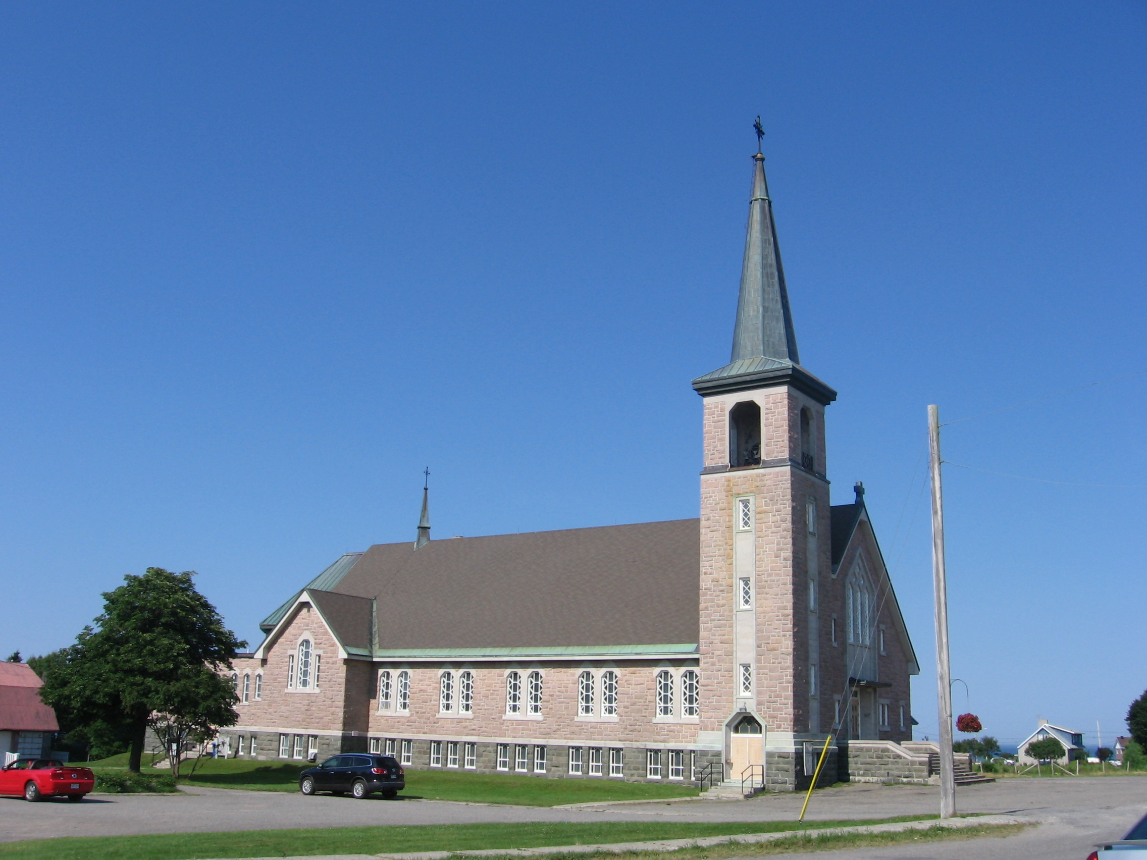 Église de Sainte-Félicité